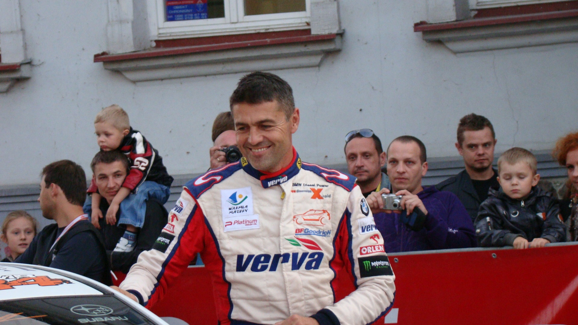 Rajd Polski 2011 - Krzysztof Hołowczyc